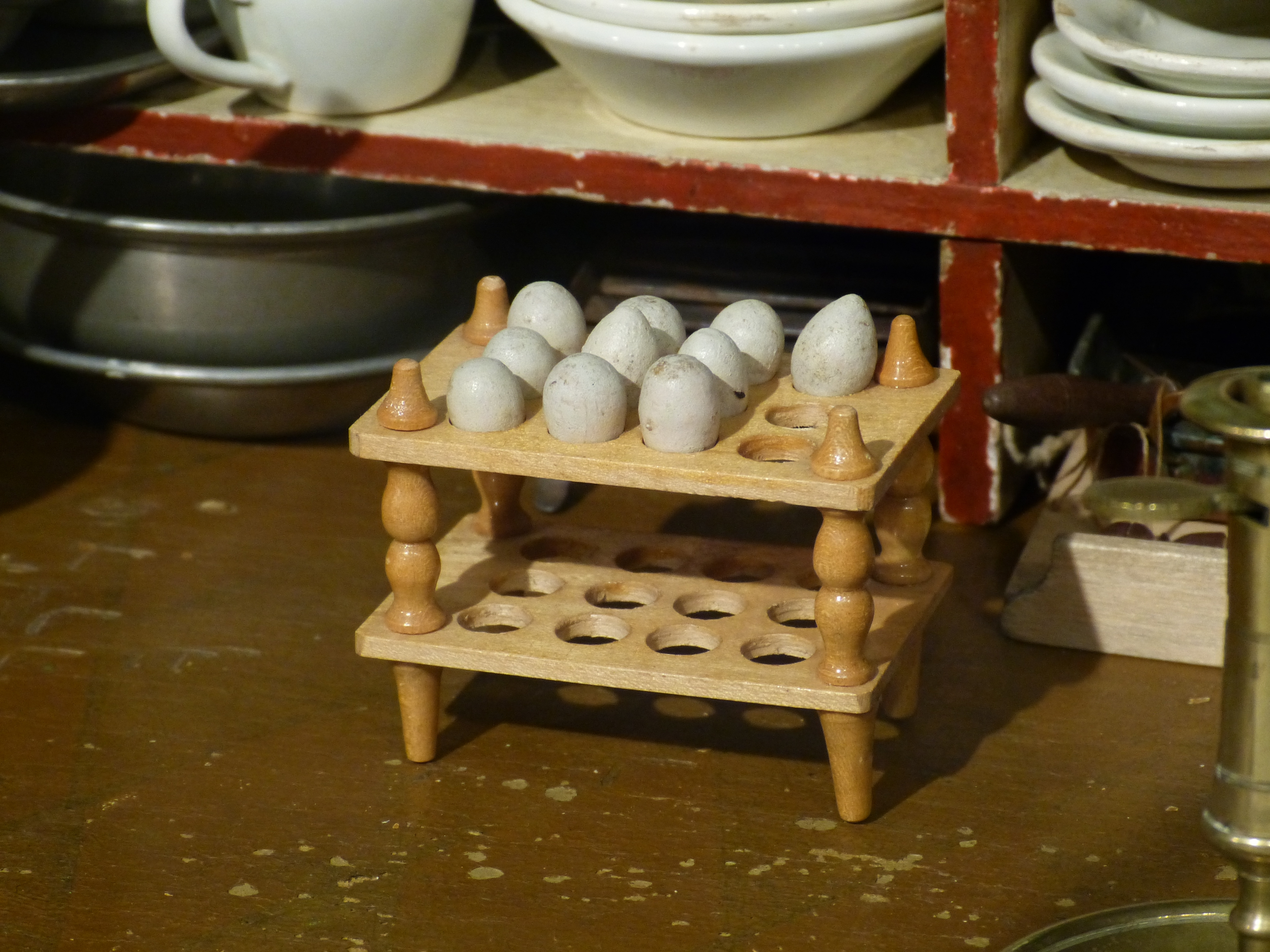 Augsburg, Maximilianmuseum